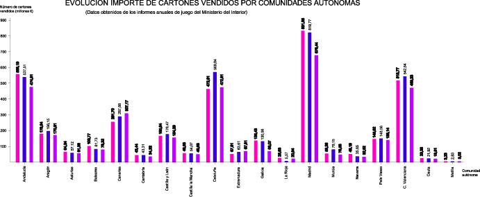 importe cartones vendidos